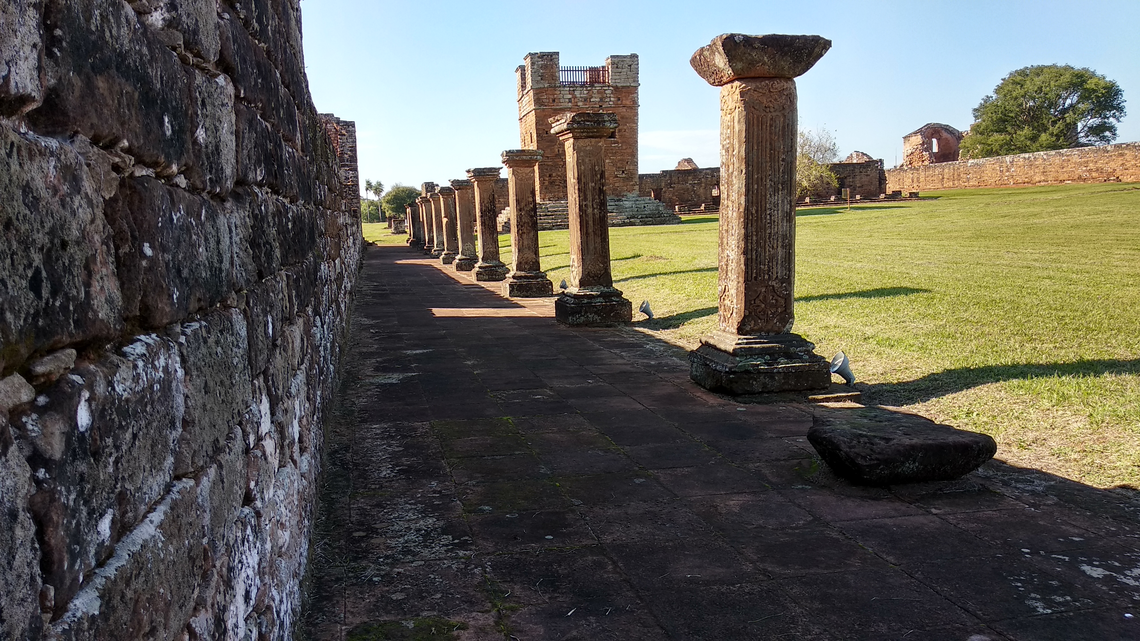 Iglesia menor